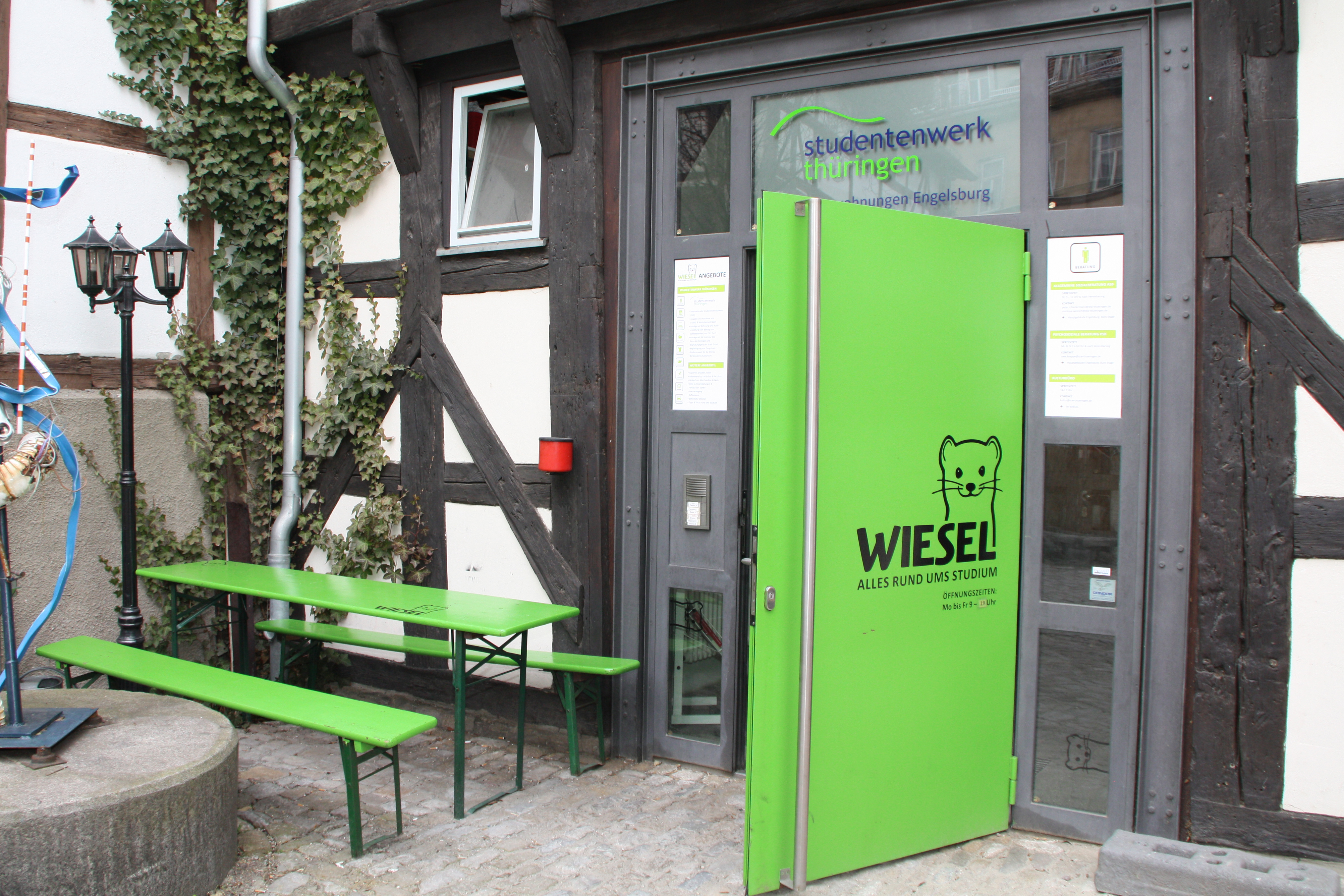 Hochschulladen WIESEL / Alles rund ums Studium